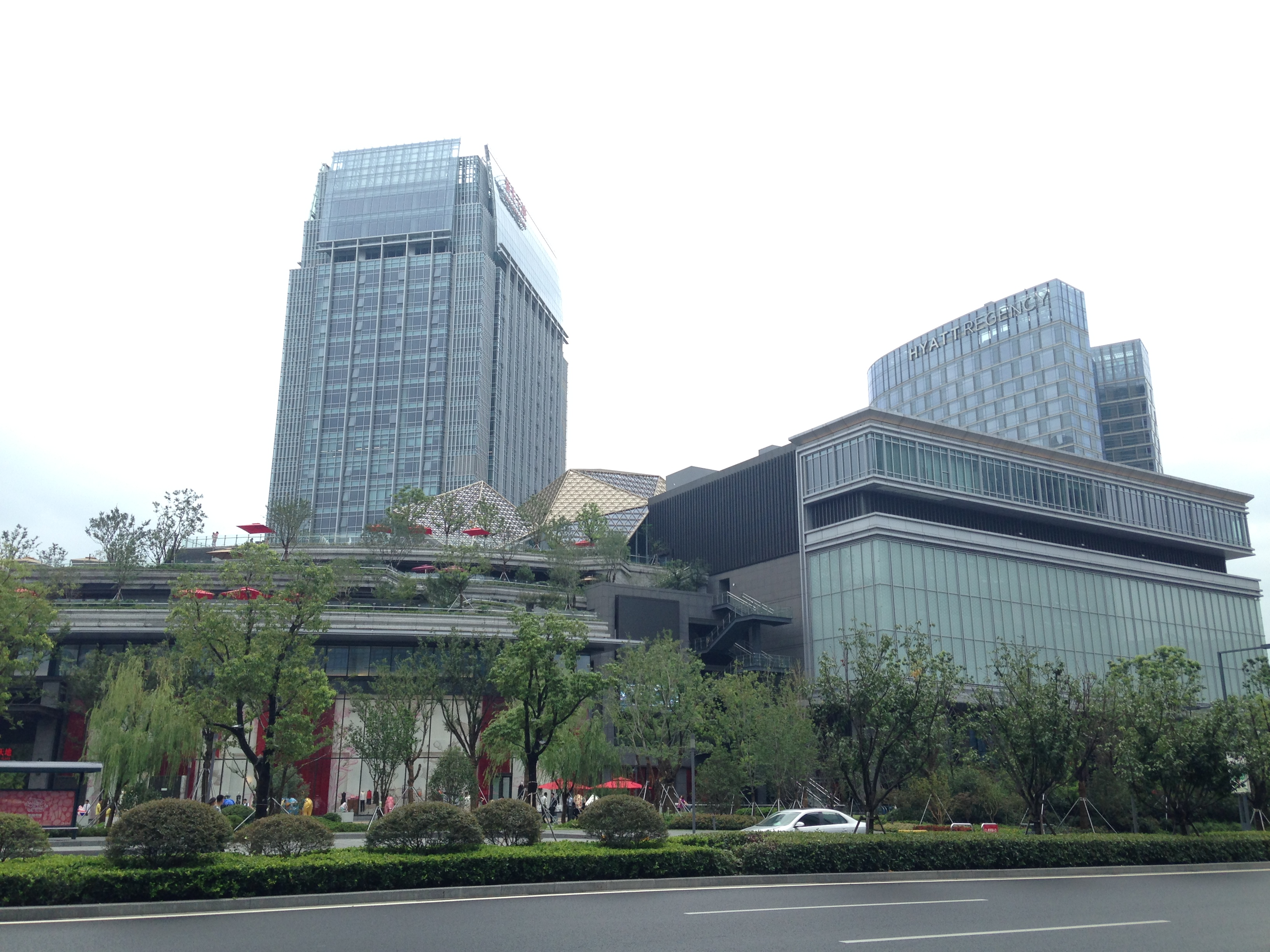 江蘇省蘇州市・新光天地